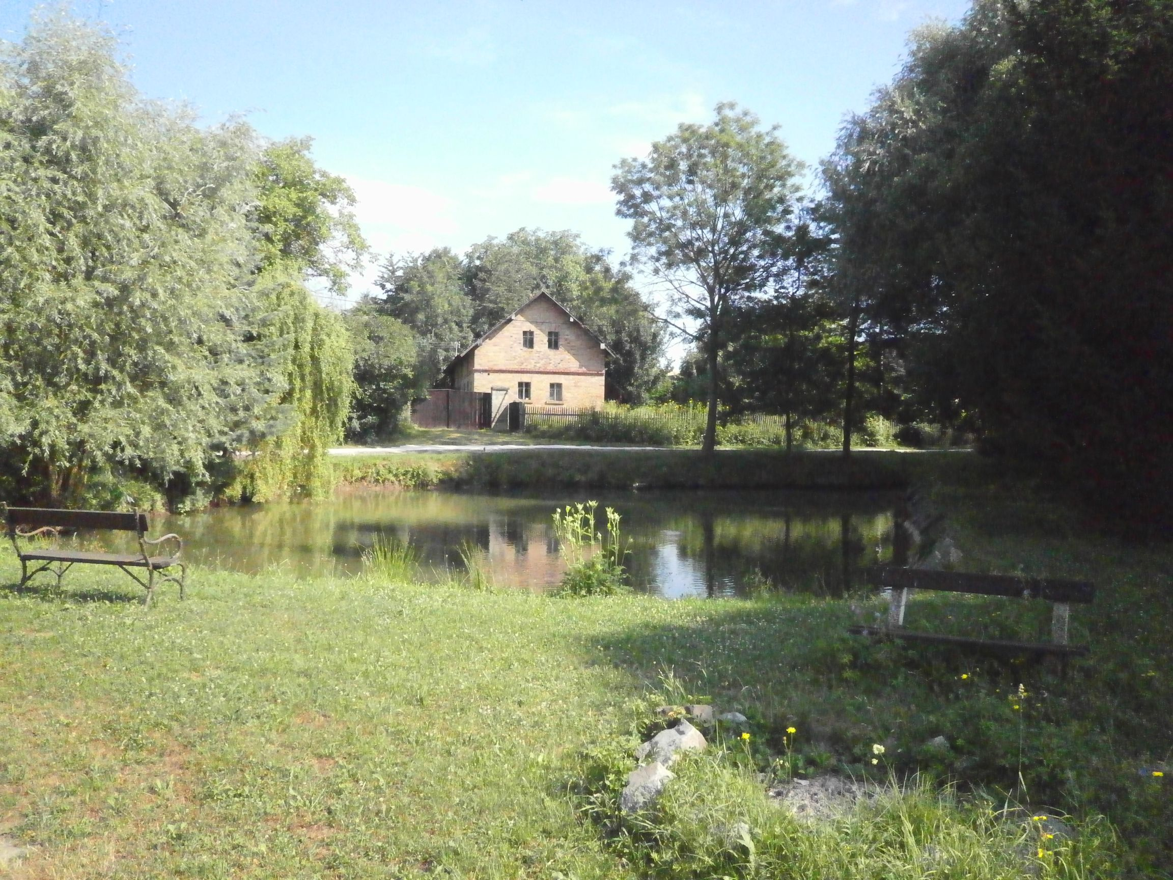 Spyšova - náves s vodní nádrží, v pozadí č.p.29